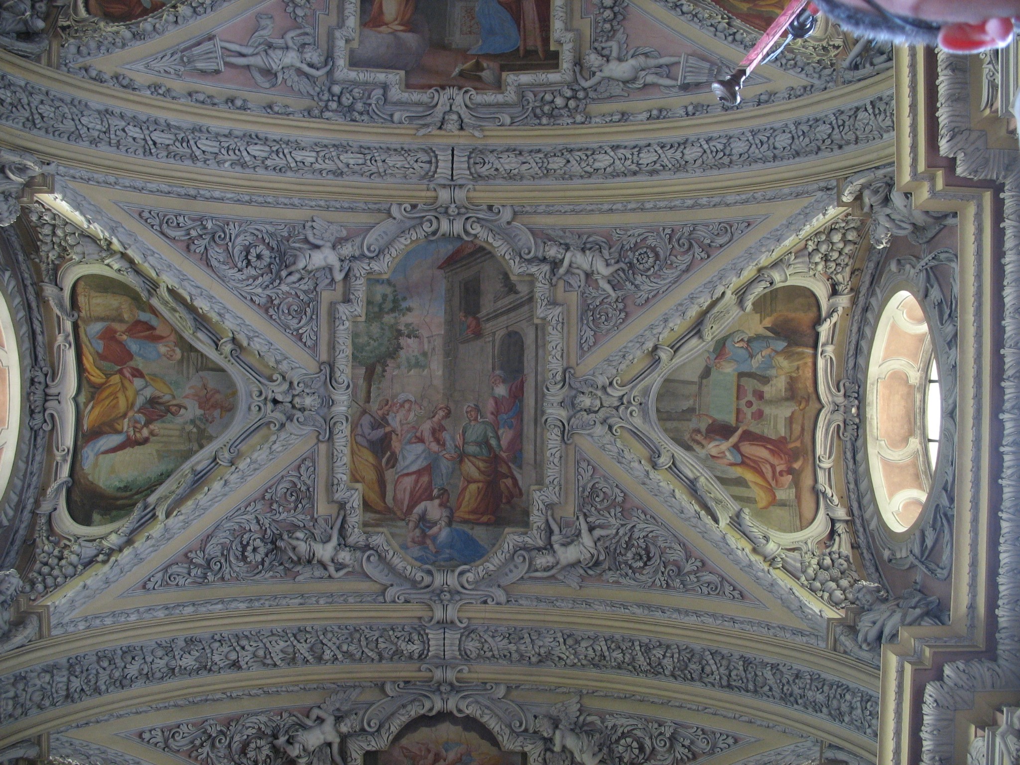 Wallfahrtskirche Frauenberg, Steiermark, Gewölbe